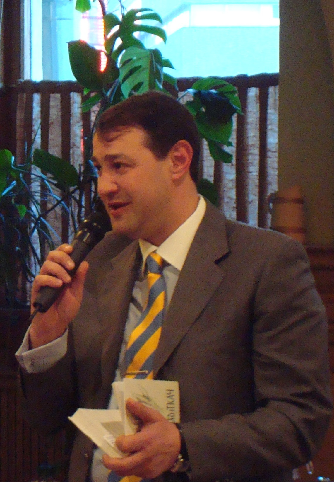 Ігор Яків’юк проголошує вітальний тост з нагоди святкування в "Буковинському земляцтві" 85-ліття Дмитра Гнатюка.